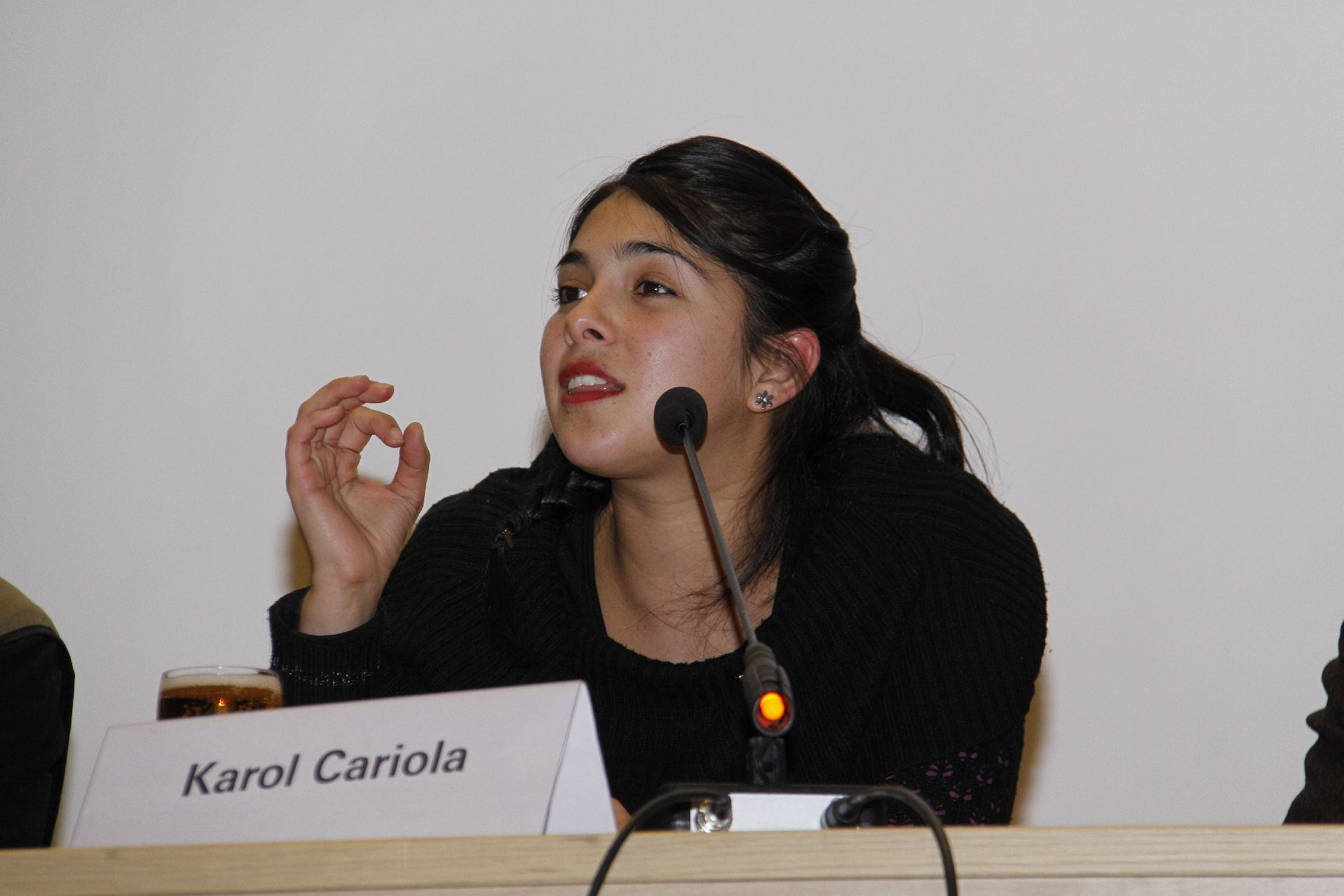 Aufstand für gerechte Bildung in Chile. Abschlussveranstaltung der Rundreise mit AkteurInnen der Protestbewegung. 8.2.2012, Berlin Mit Camila Vallejo, Vize-Präsidentin der Federación de Estudiantes de la Universidad de Chile (Studentenvereinigung der Universität von Chile); Karol Cariola, Studentin, Generalsekretärin der Juventudes Comunistas de Chile (Kommunistischen Jugend); Jorge Murúa, Mitglied in der Leitung des Gewerkschaftsdachverbandes Central Unitaria de Trabajadores de Chile (CUT); Andreas Keller, GEW; Paula Rauch, Die Linke.SDS; Moderation: Malte Daniljuk, Rosa-Luxemburg-Stiftung